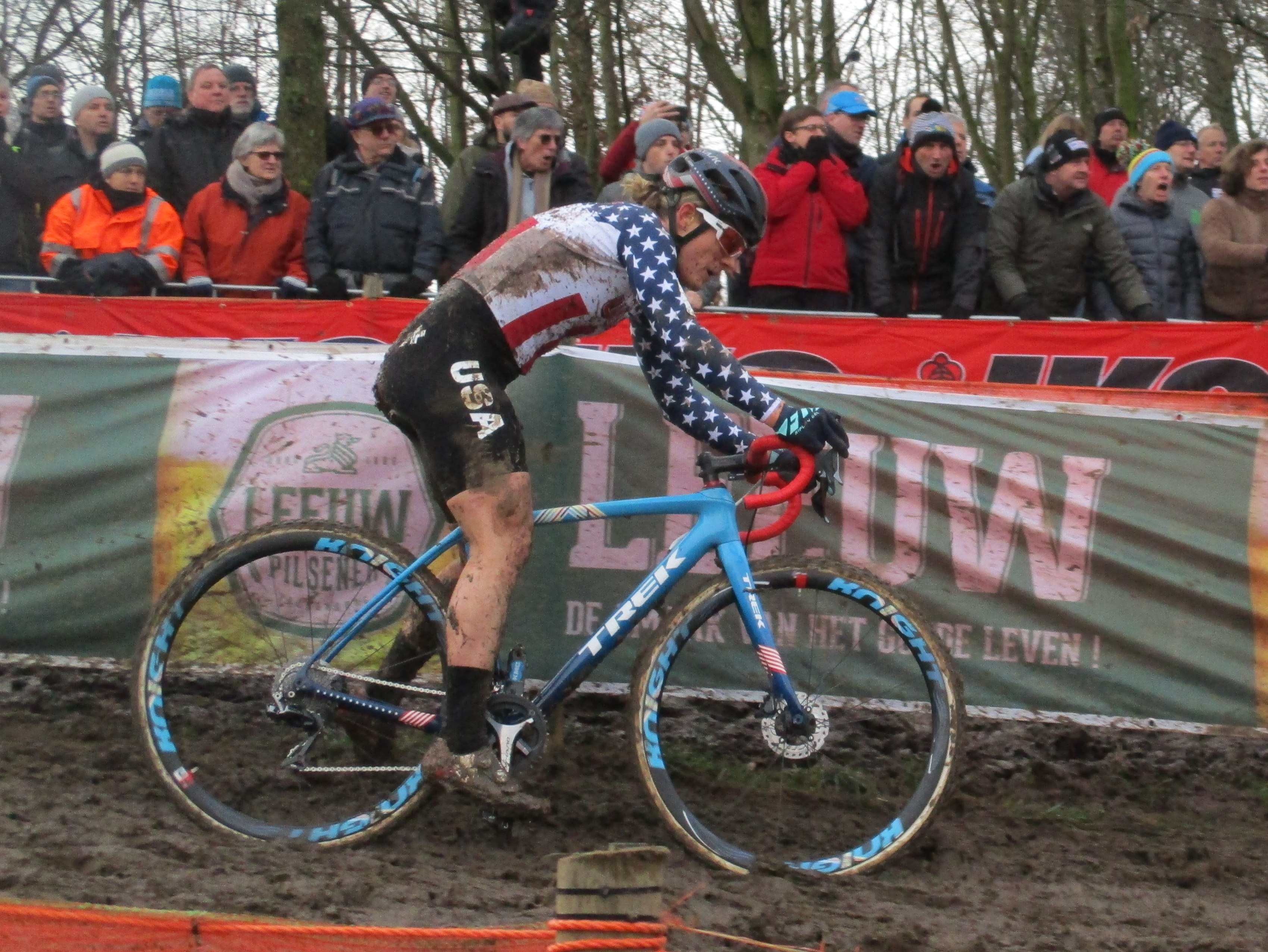 Wereldkampioenschappen Veldrijden op 3 en 4 februari 2018 op de Cauberg in Valkenburg, Limburg, Nederland. Wedstrijd van de vrouwen elite. Ronde 4 van 4.